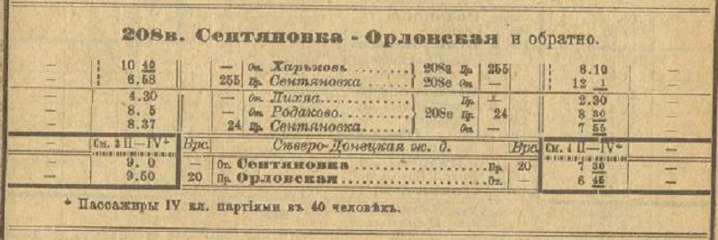 Официальный указатель железнодорожных, пароходных и других пассажирских сообщений. 1916-1917 г.г. - М., 1916.